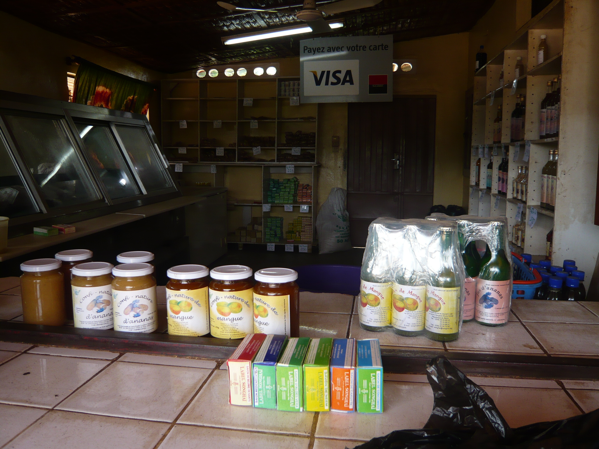 Butiko en Songhai Centro en Porto Novo, Benino